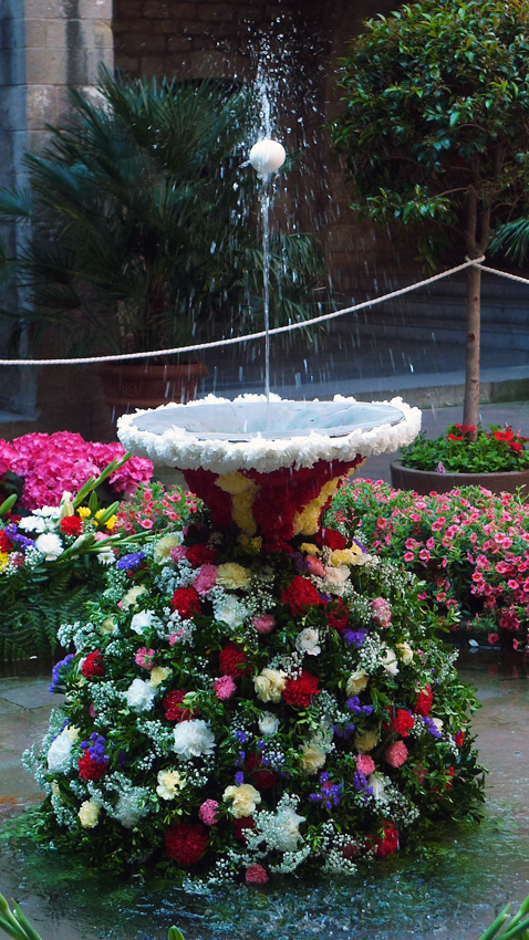 Ou com balla al brollador del pati del Museu Frederic Marès